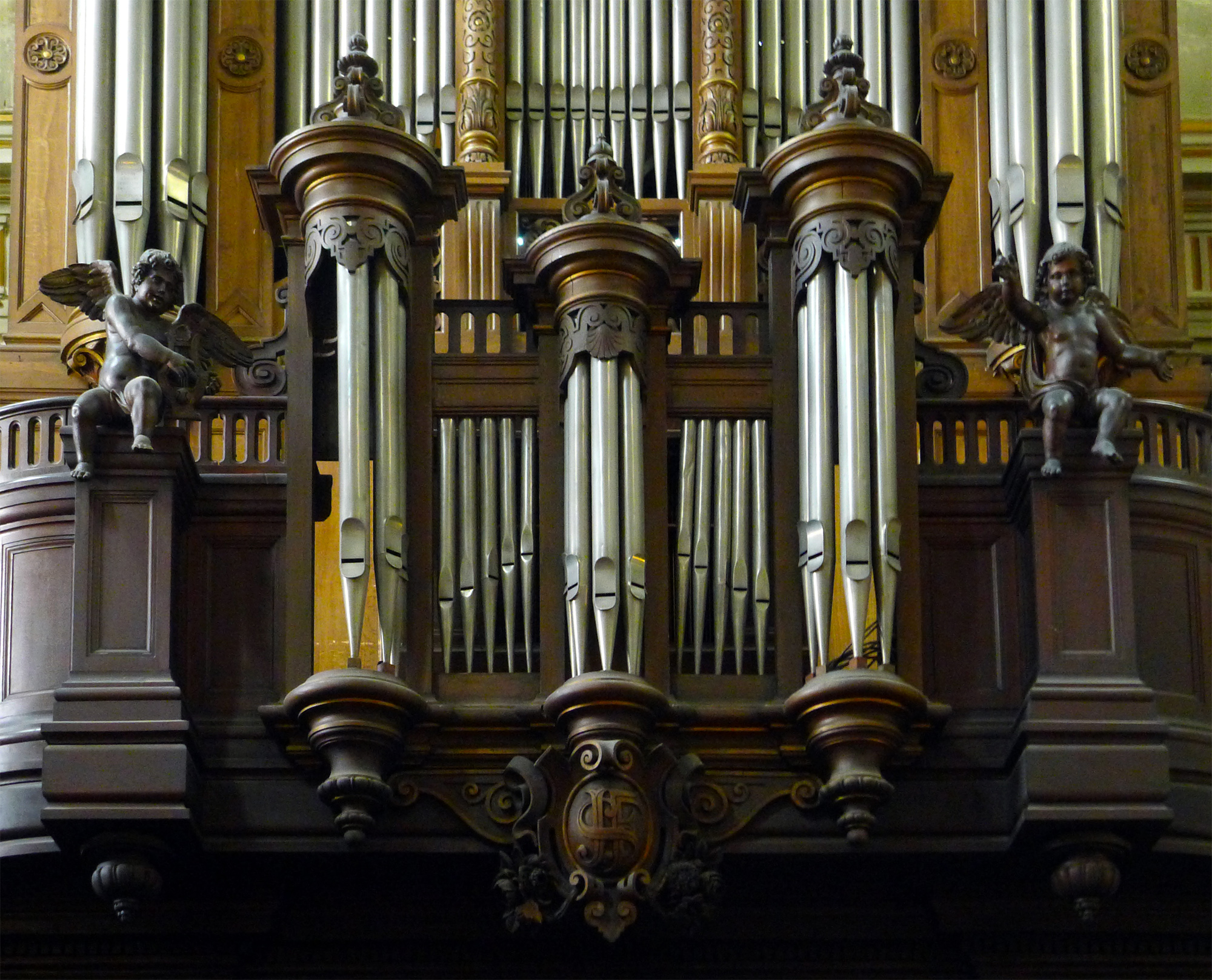 Cathédrale arménienne catholique sainte-Croix-de-Paris (orgue) - Paris III